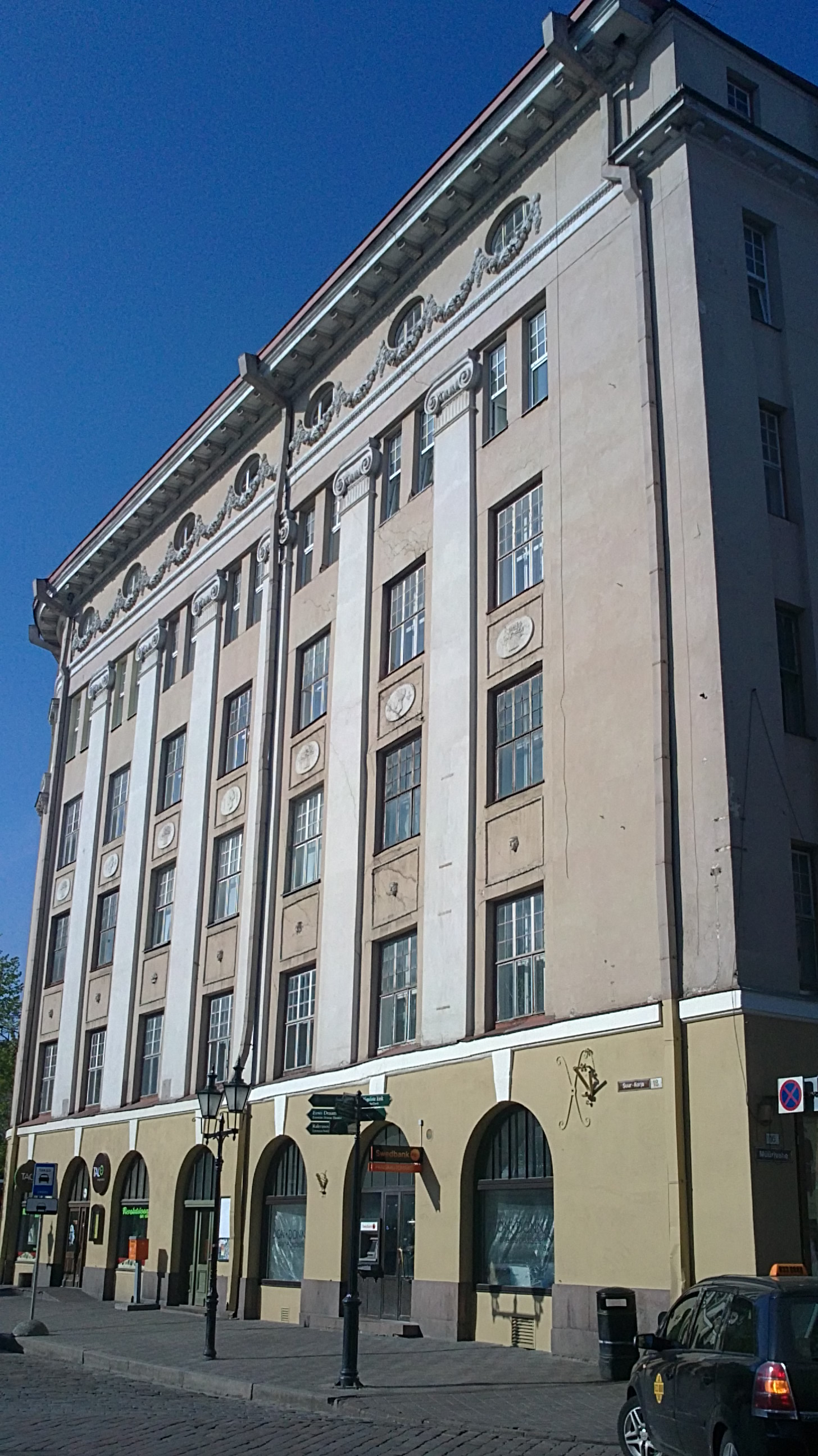 Hoone Vanalinna asumis aadressil Suur-Karja 18 // Müürivahe 14/16 // Vabaduse väljak 2